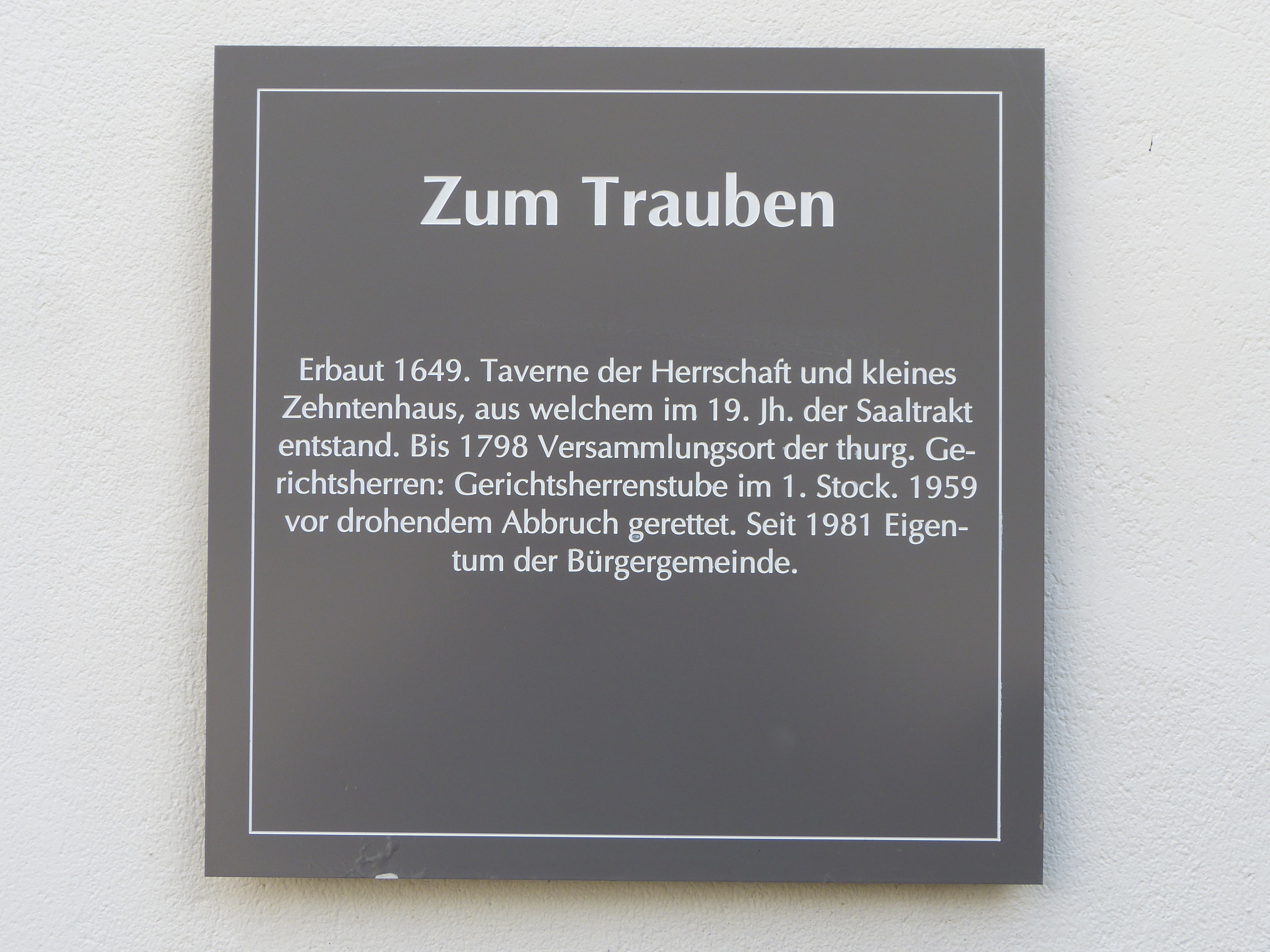 Gasthaus «Zum Trauben»